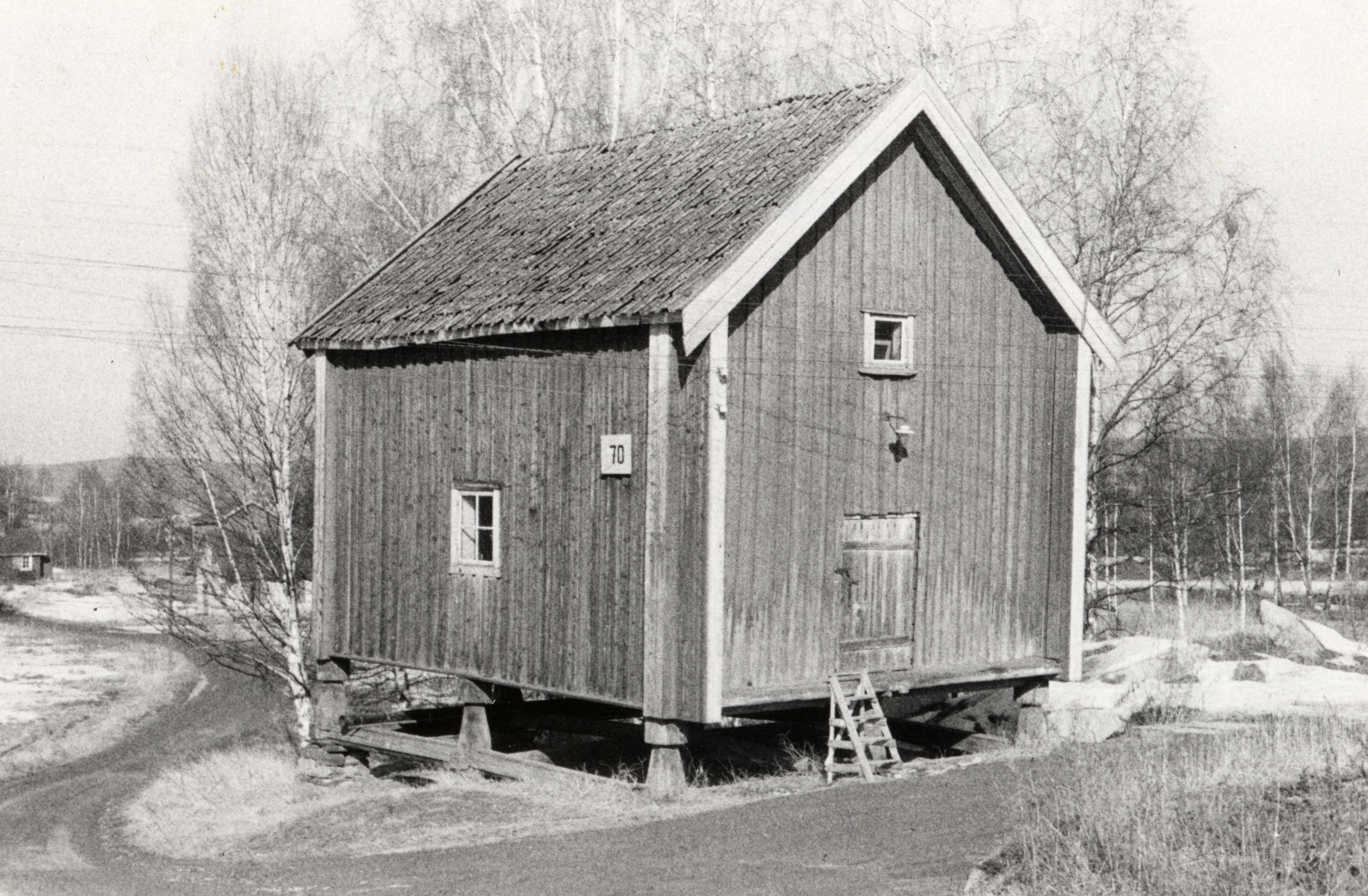 Helgelandsmoen i Hole, Buskerud Flyttet fra Tanbergmoen i 1869